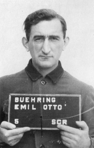 Haftbogenfoto des Angeklagten Emil Otto Bühring (19.9.1902 in Abbehausen - 15.12.1958 in Abbehausen), SS-Aufseher im Bunker des Konzentrationslagers Mittelbau-Dora, im Dachauer Dora-Prozess ("Case No. 000-50-37 Dora") am 30.12.1947 zu lebenslanger Haft verurteilt.